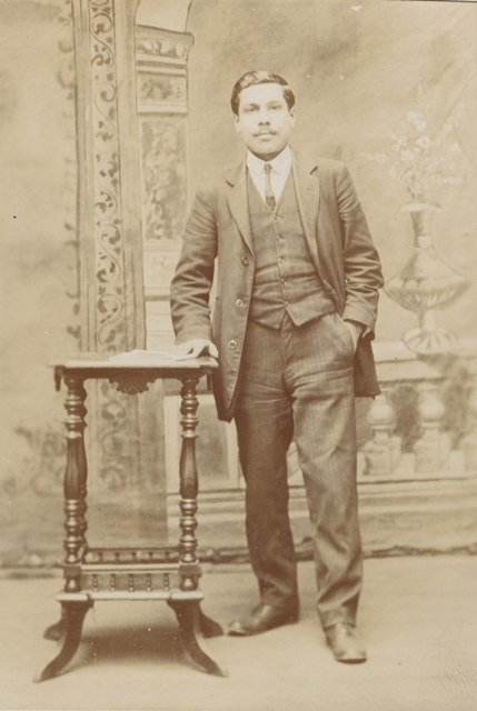 Pedro Nolasco Arratia Urrutia (1876 - 1961)